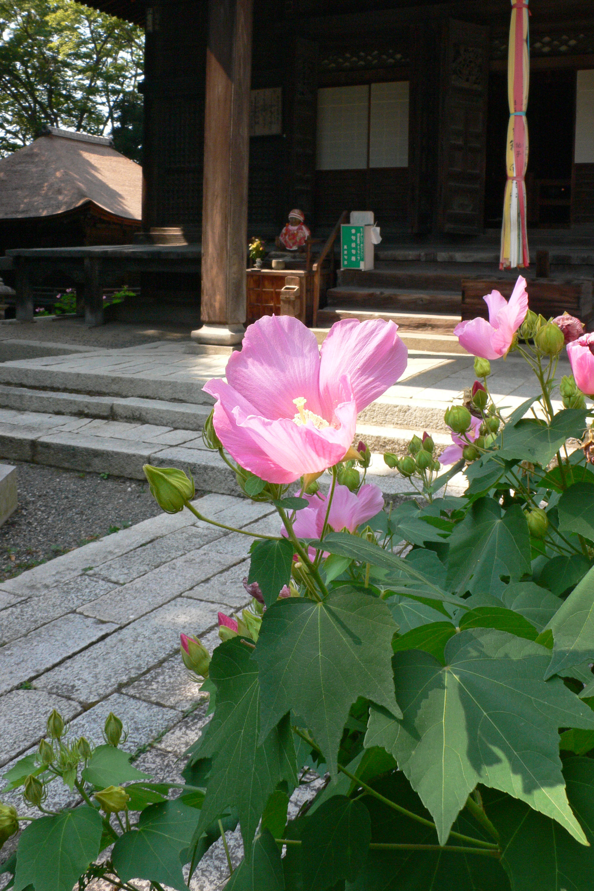 Shanain in Nagahama, Shiga, Japan